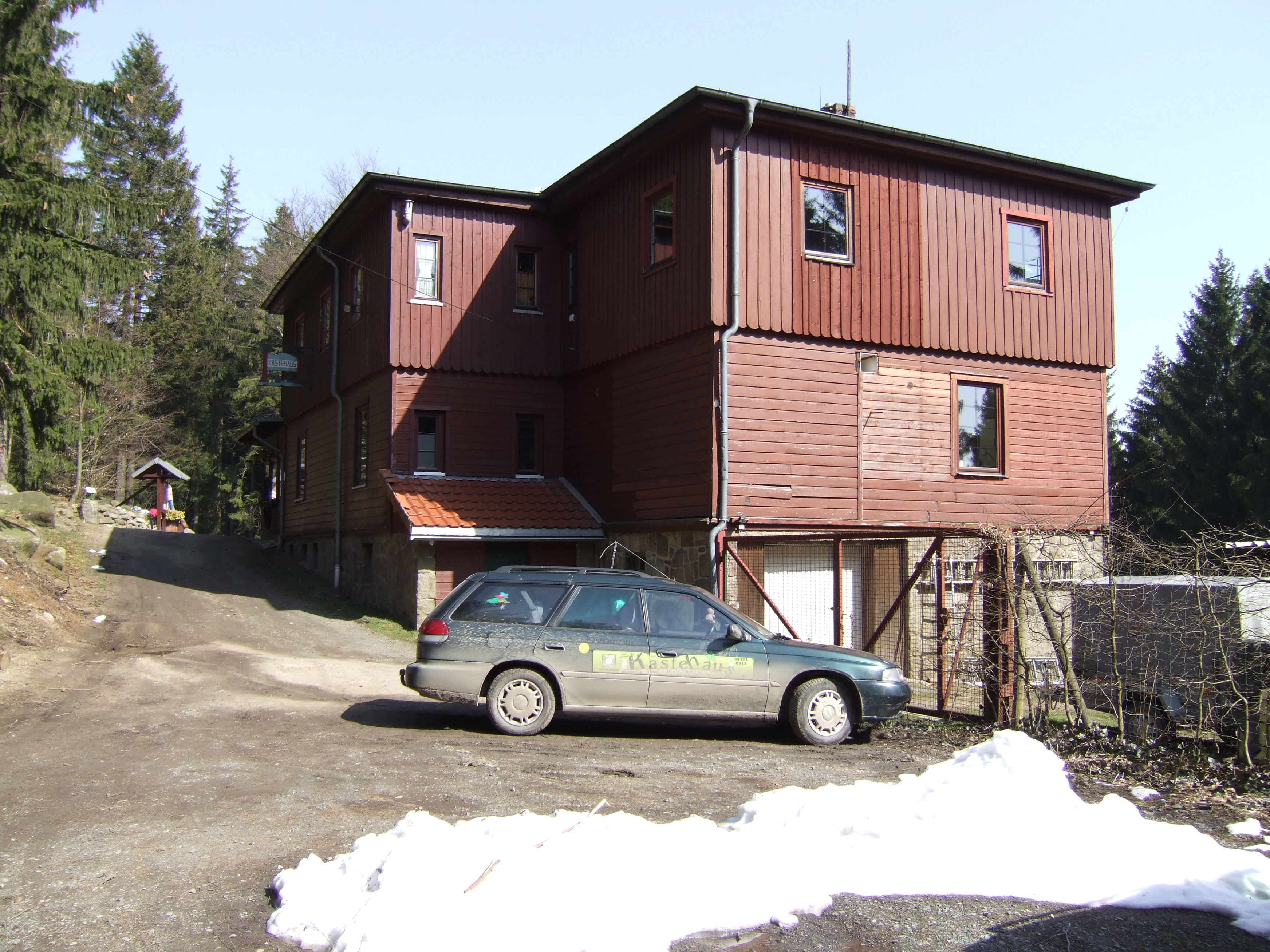 Kästehaus in unmittelbarer Nähe der Kästeklippen